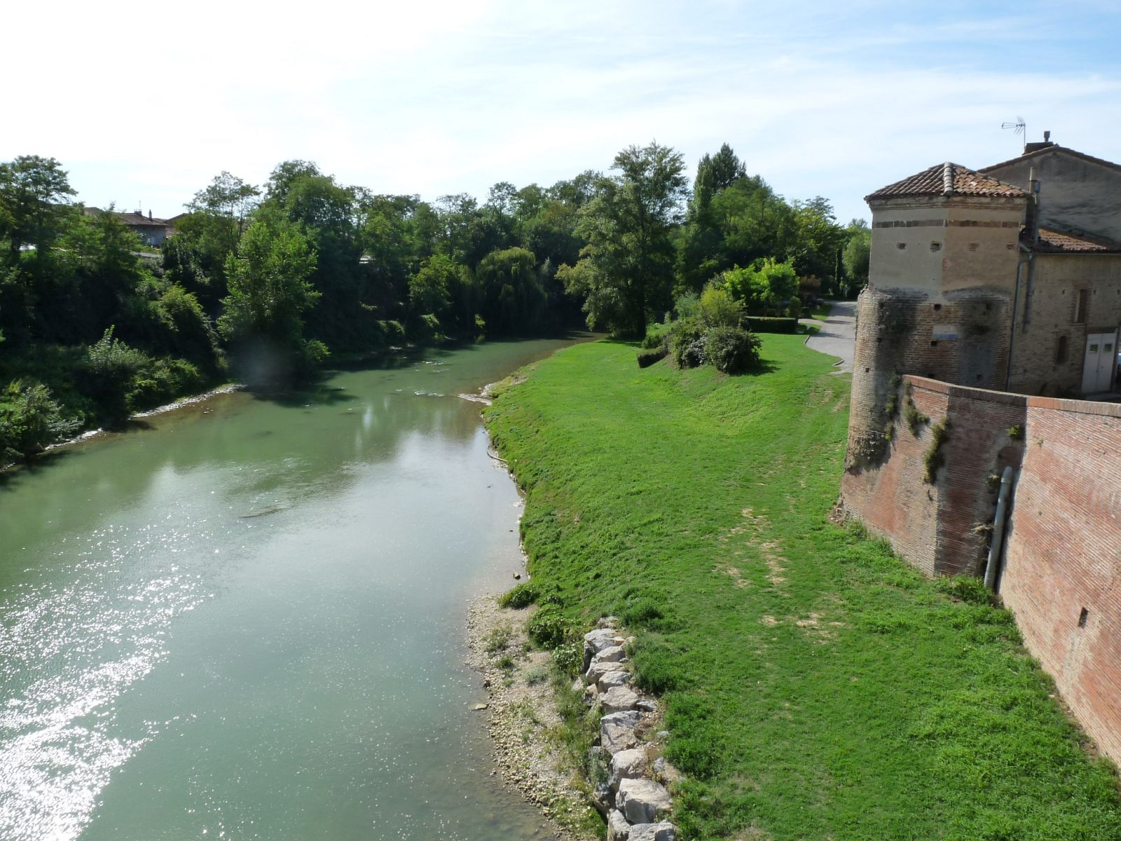 L'Hers, Calmont, Haute-Garonne, France